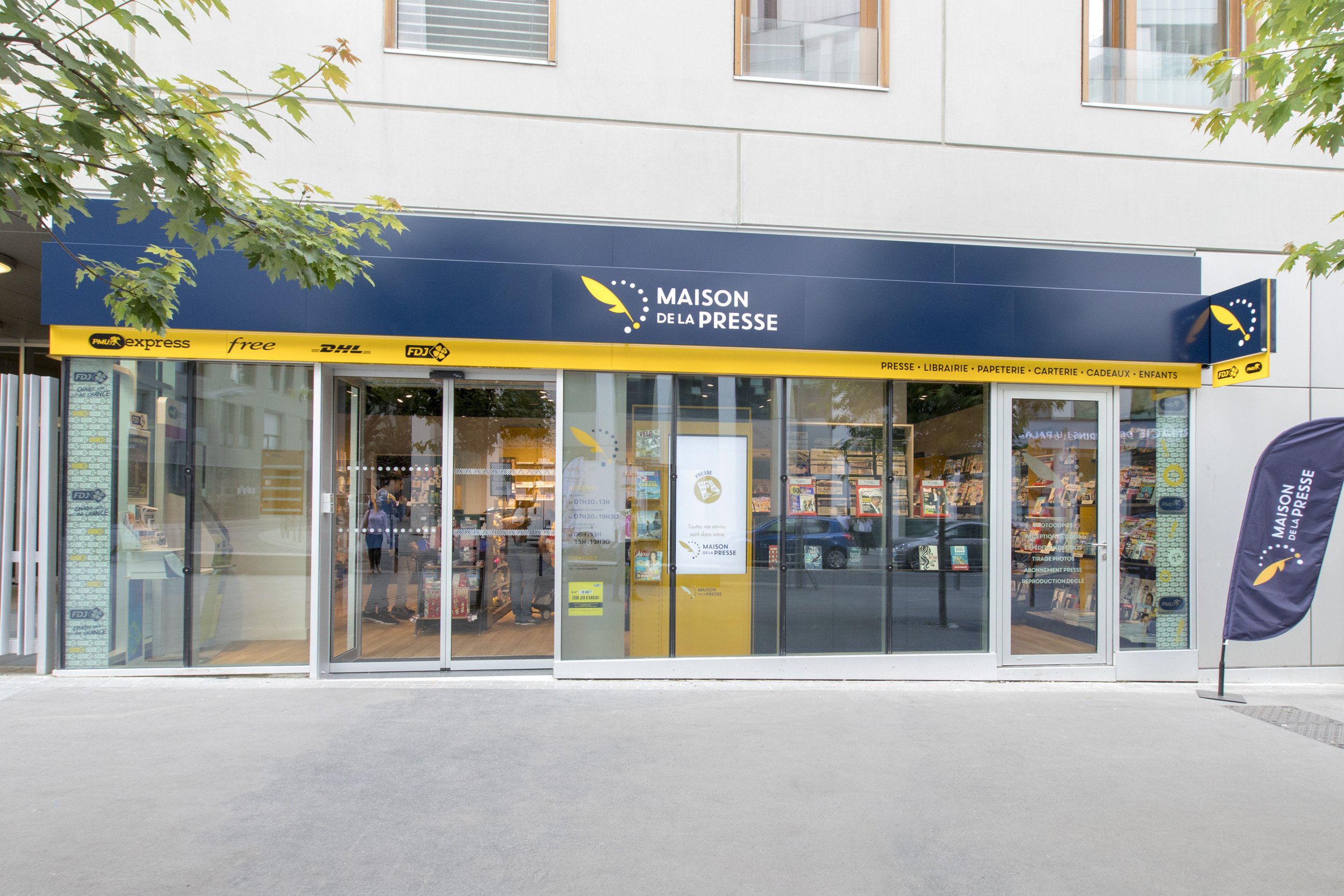 Façade d'une Maison de la Presse à Batignolles, Paris 17